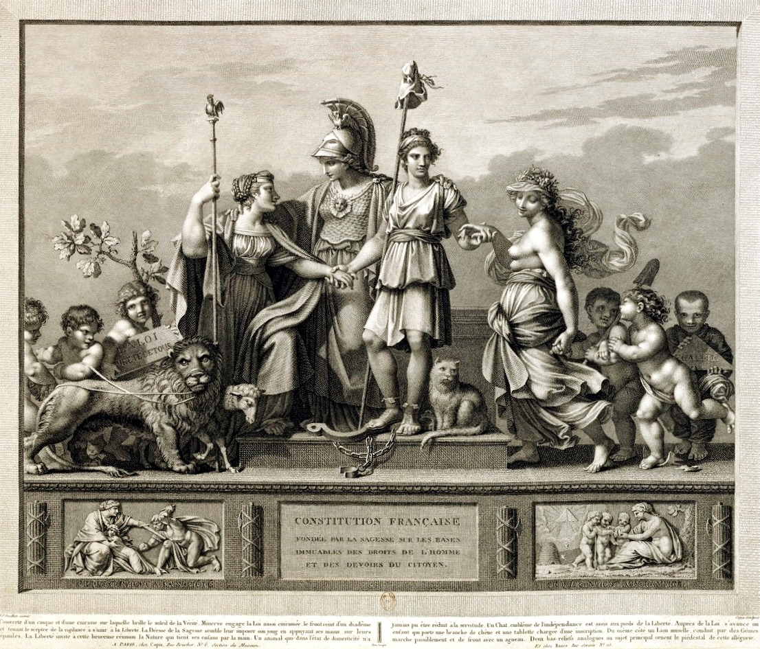 Constitution française fondée par la sagesse sur les bases immuables des droits de l'homme et des devoirs du citoyen. Gravé par Jacques-Louis Copia (1764-1799) d'après le peintre Pierre-Paul Prud'hon (1758-1823).